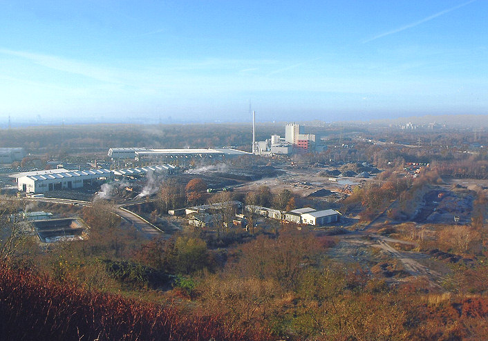 Bergblick auf die Deponie im Altwarmbüchener Moor. aha-Betriebsgelände in Hannover-Lahe, aufgenommen aus 65 m Höhe vom Deponieberg Monte Müllo.